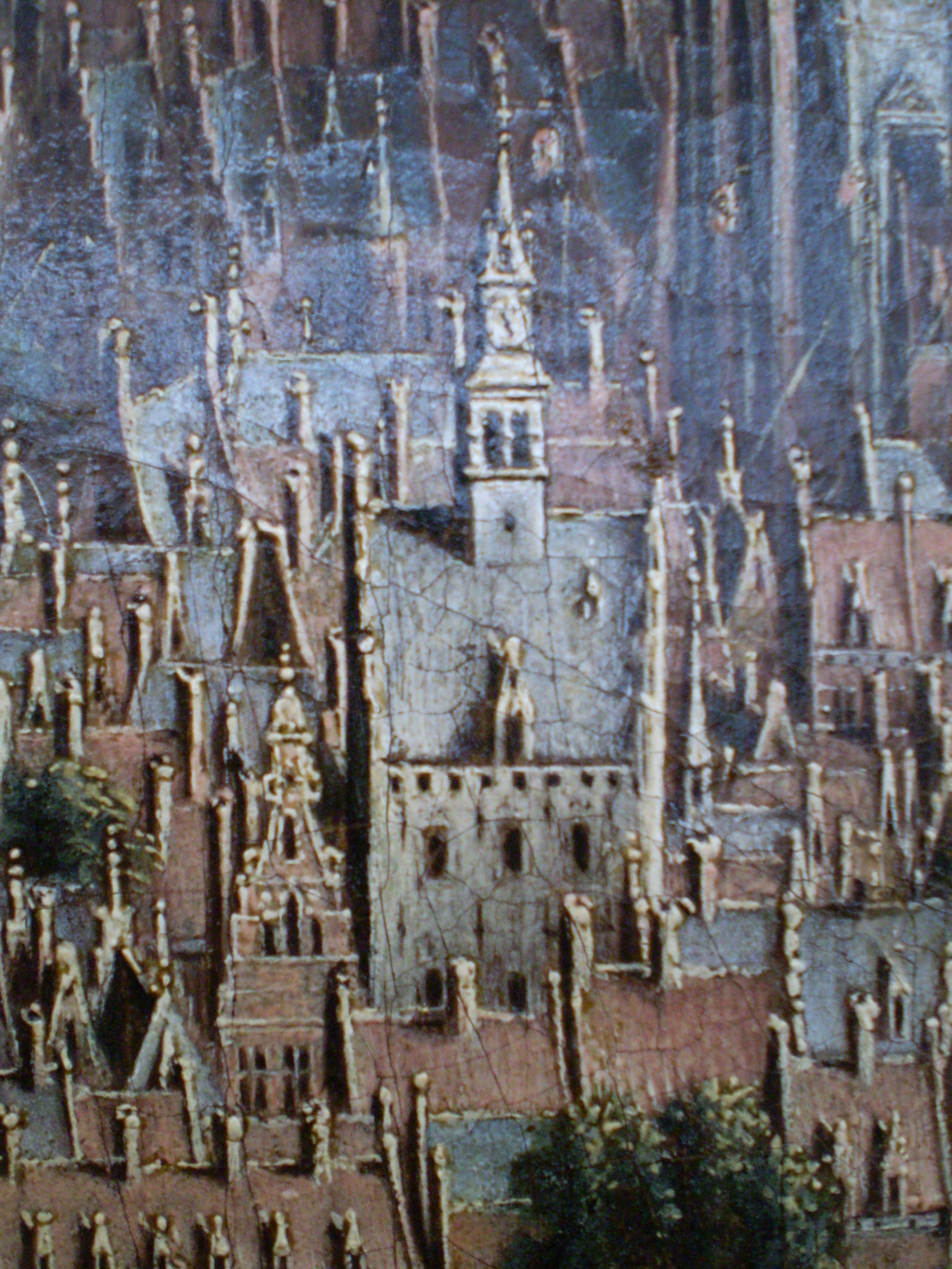 Porte à Peine Perdue (Verloren Coost Poort), Bruxelles vers 1664. Détail de la «Vue de Bruxelles» de Jan Baptist Bonnecroy - Musée des Beaux-Arts de Belgique